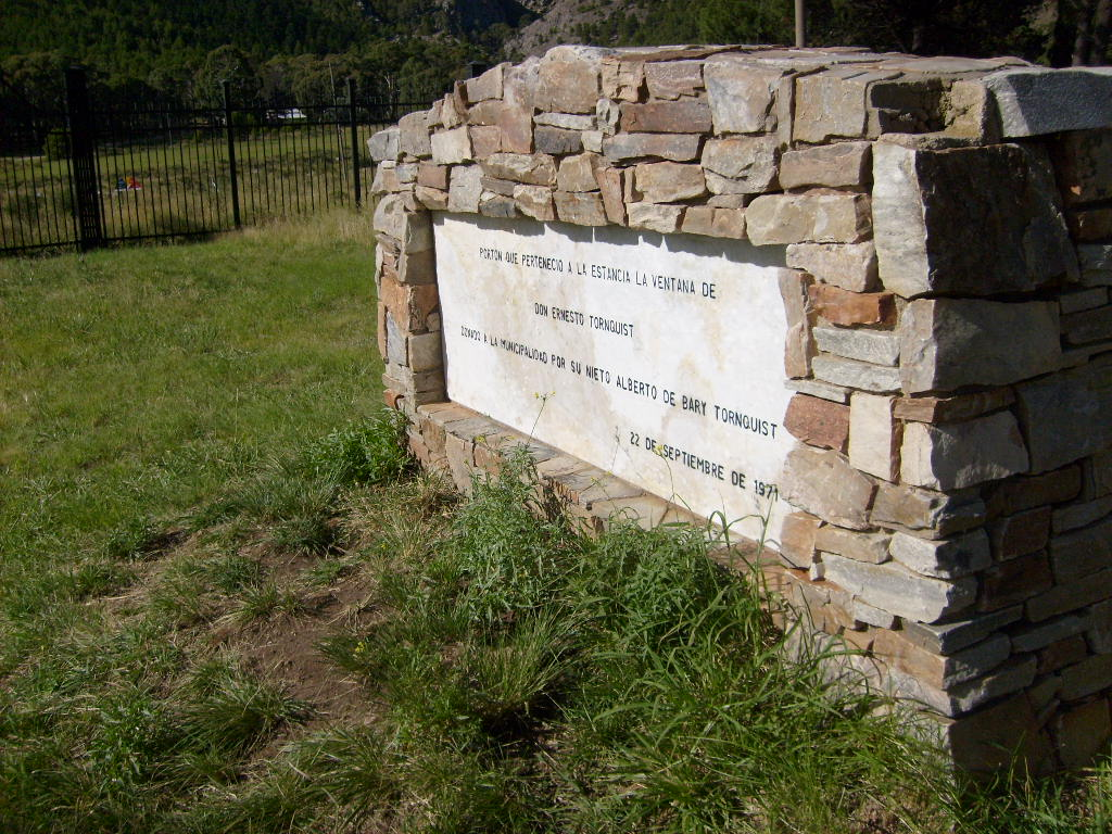 Placa conmemorativa de la donación de la estancia Ventana a la provincia de Buenos Aireas para la creación del Parque Provincial Ernesto Tornquist